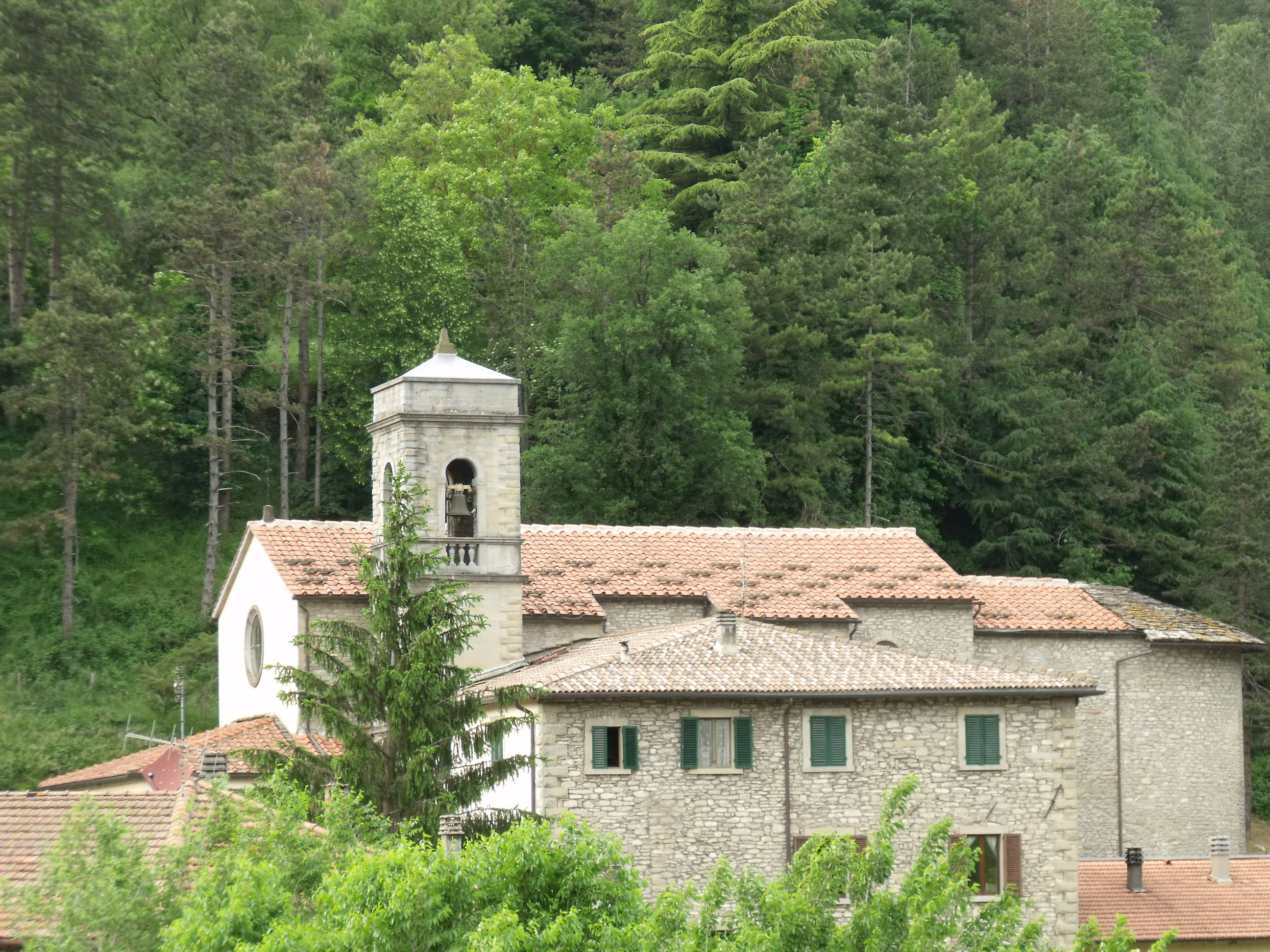 Chiesa di Santo Stefano in Palazzuolo sul Senio